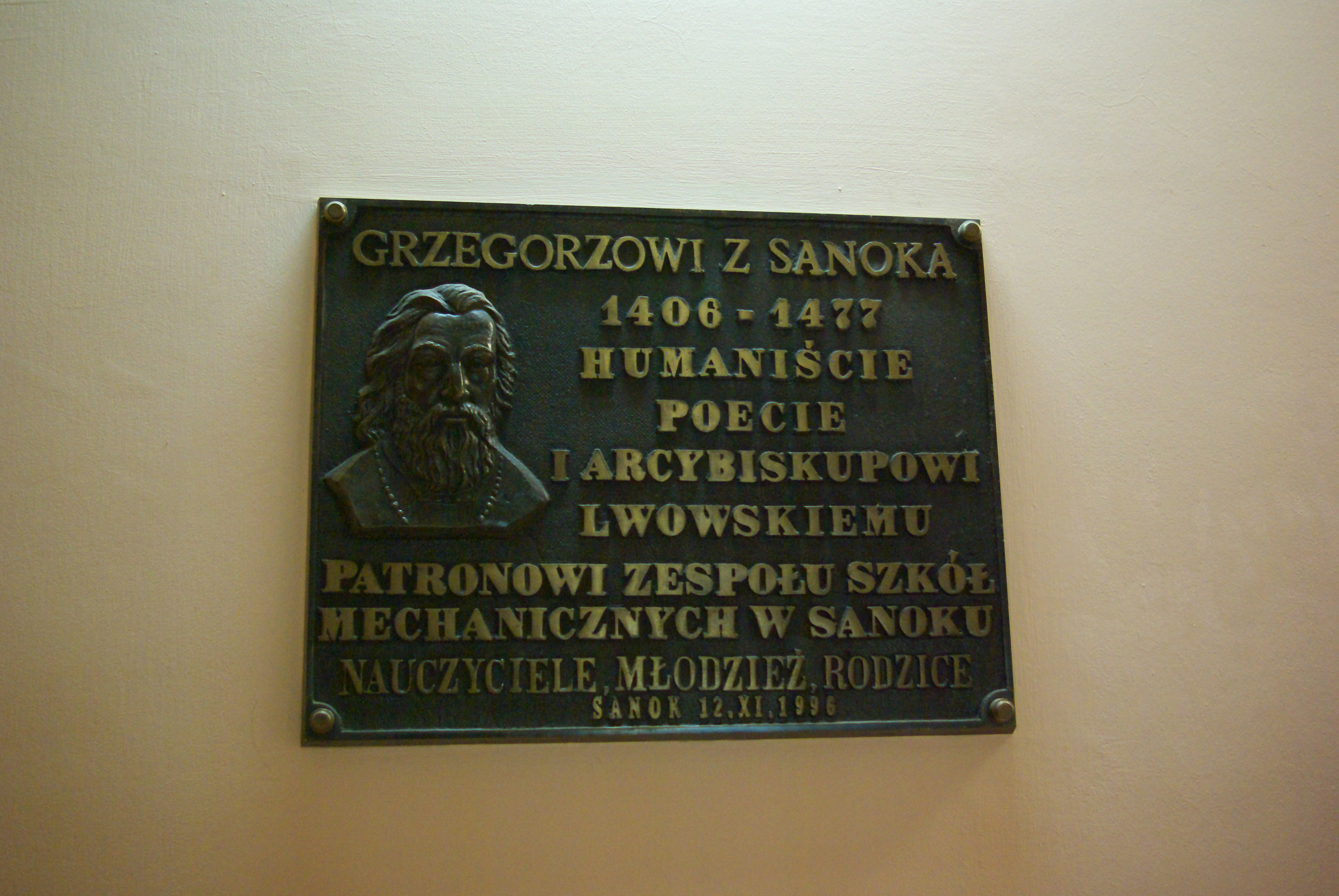 Zespół Szkół nr 2 im. Grzegorza z Sanoka w Sanoku. Tablica pamiątkowa Grzegorz z Sanoka